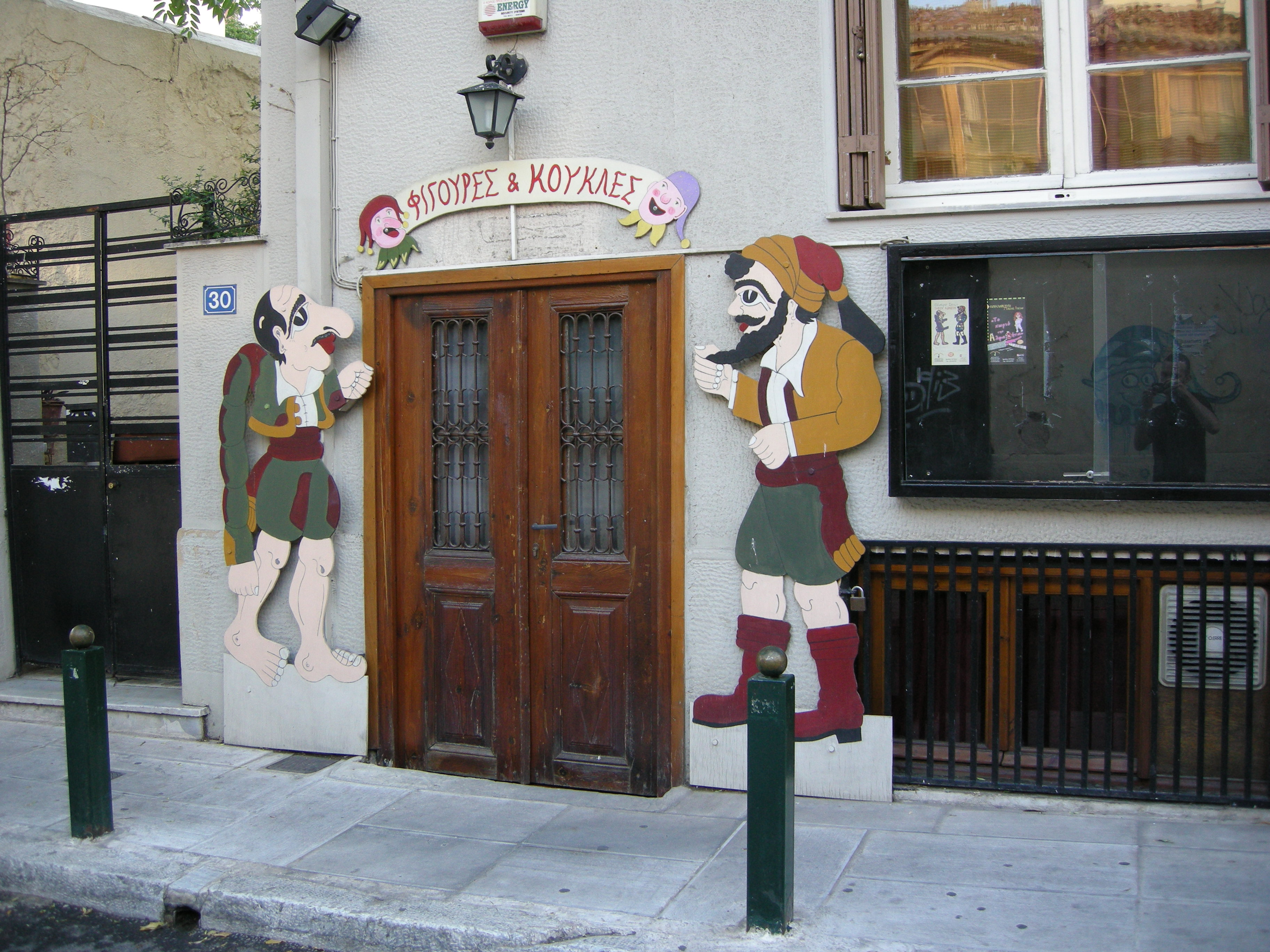 Plaka, door